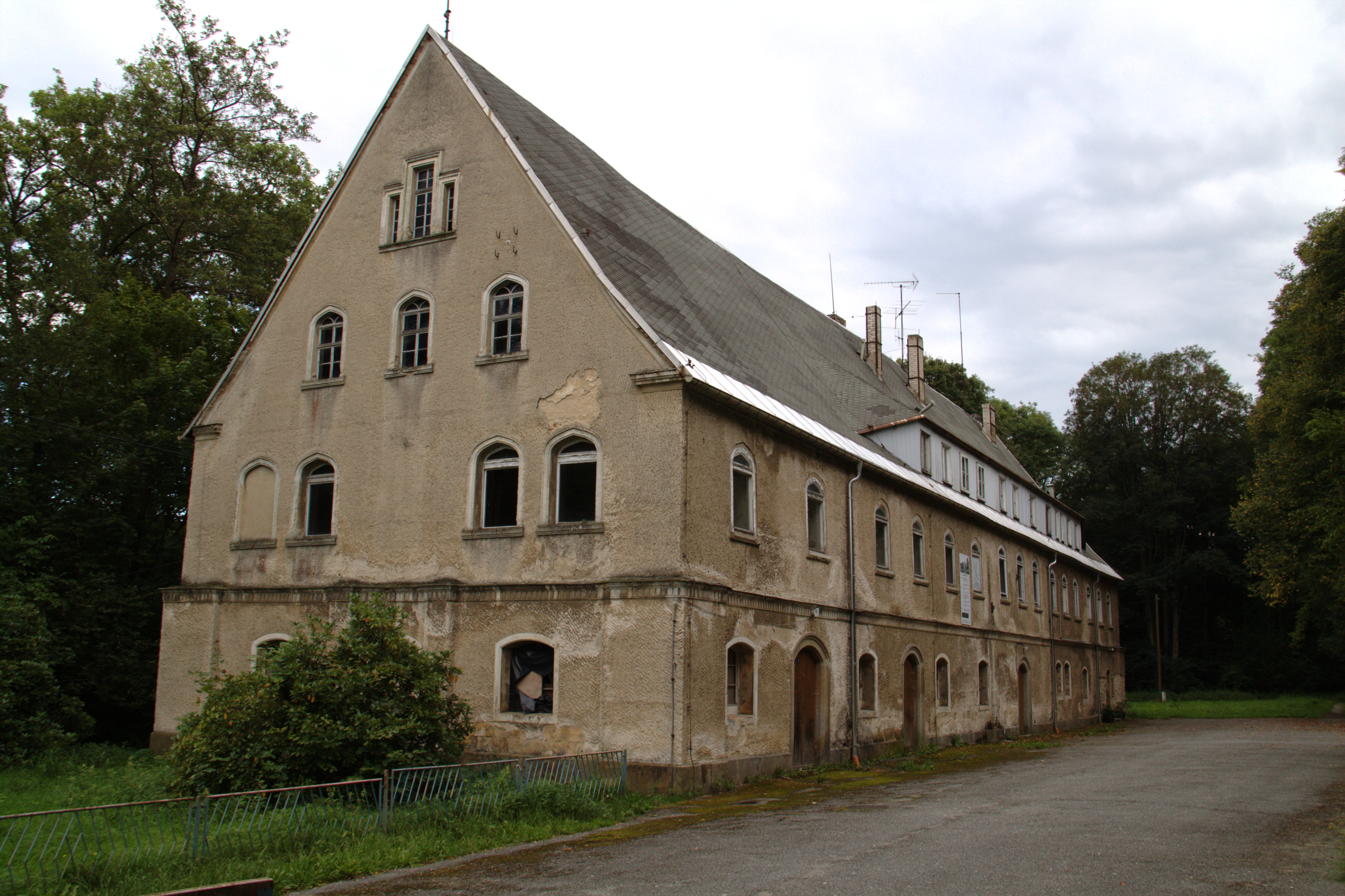 Oppacher Schloss, Blickrichtung Süden